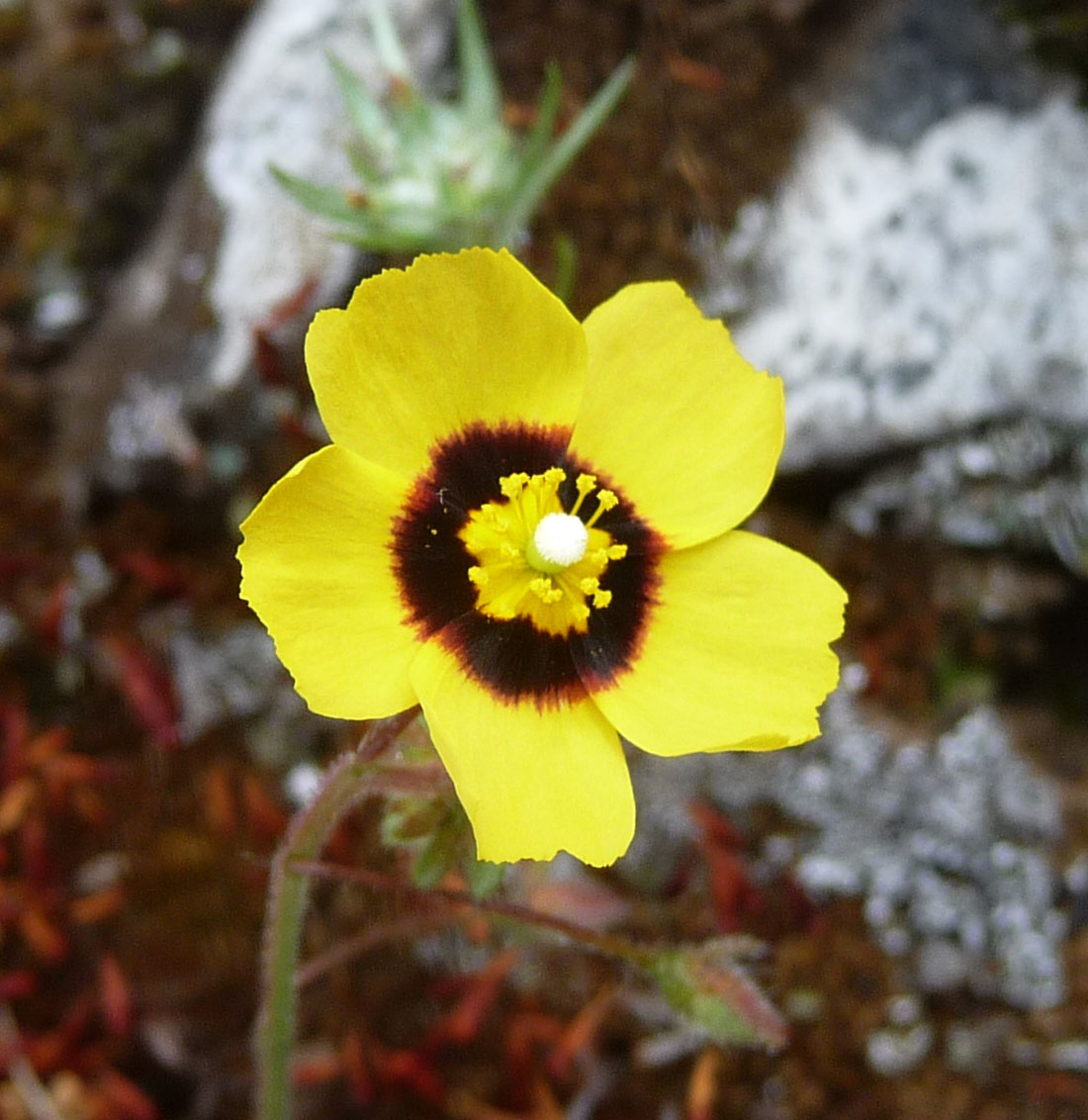 Tuberaria guttata - Spotted rockrose -Annual Rockrose - (Cistaceae)